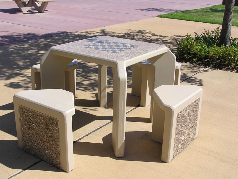 Una mesa del ajedrez en un parque